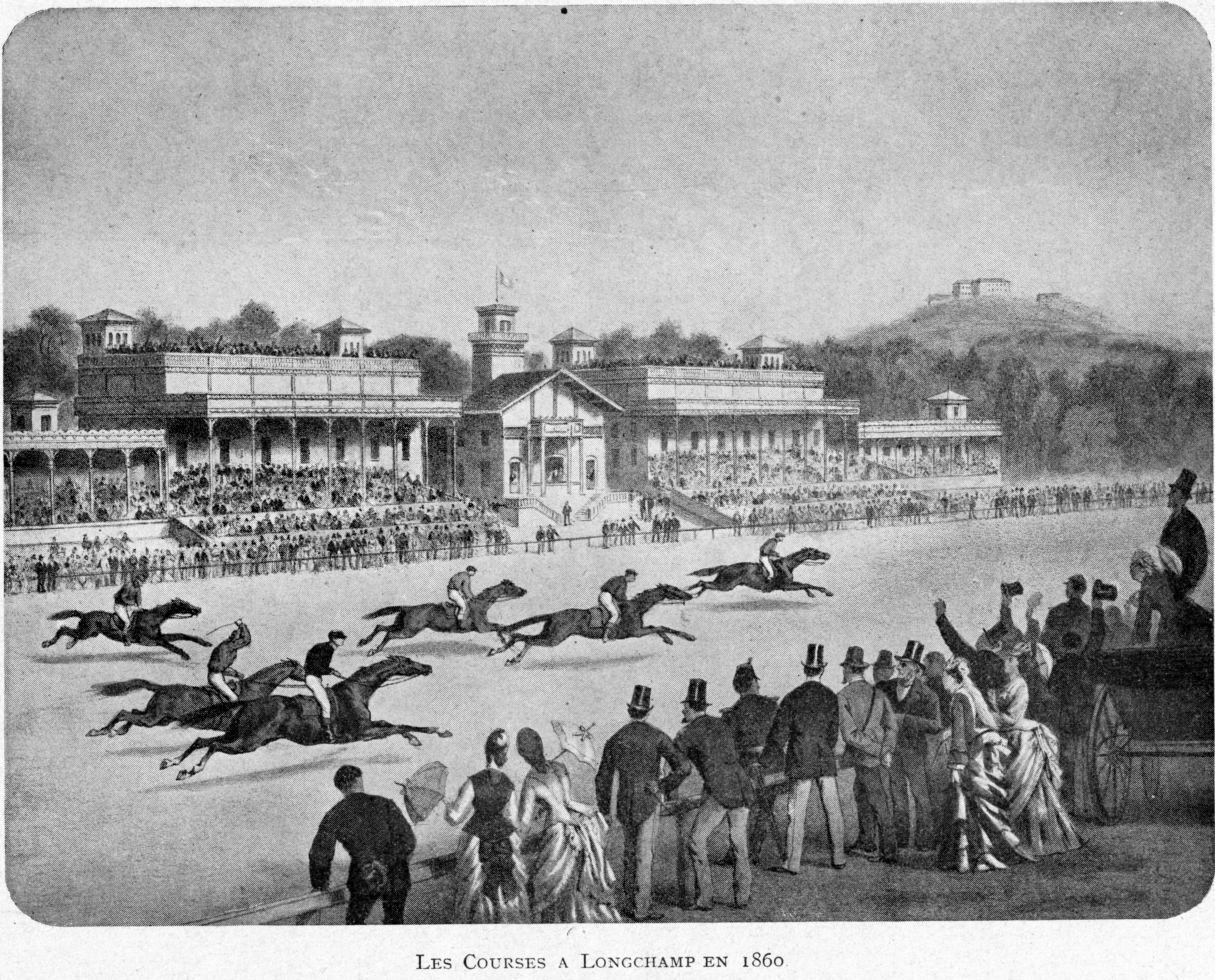 Corbel036 Les courses à Longchamp en 1860